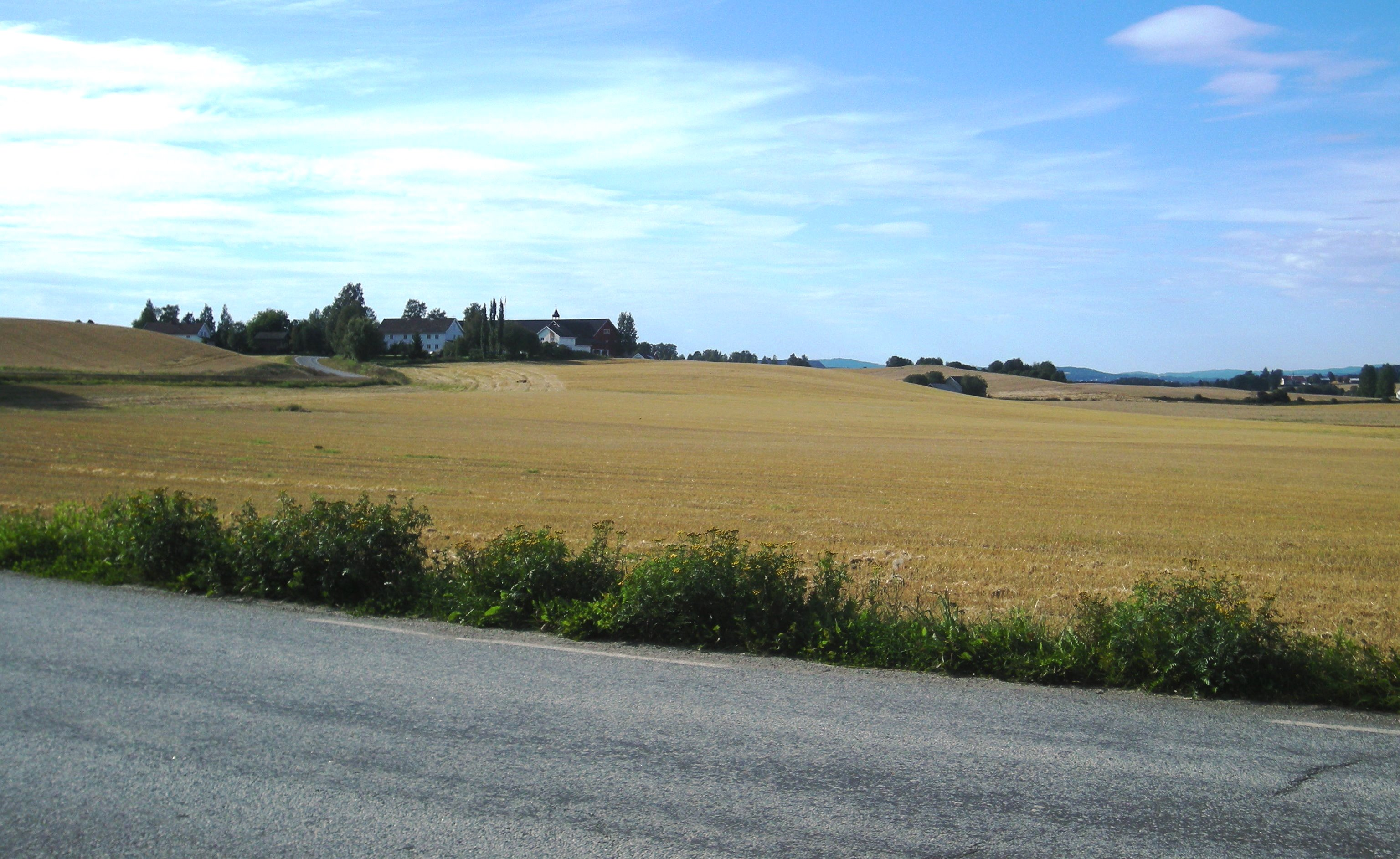 Fylkesvei 1874 (tidl. 211) i Romedal, Hedmark